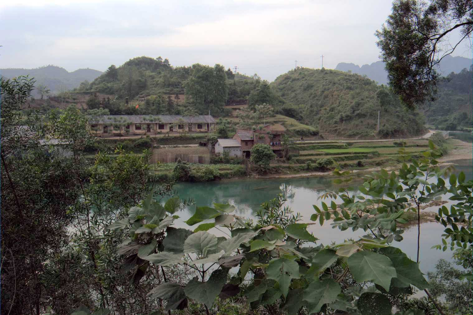 Quang cảnh huyện Trùng Khánh, tỉnh Cao Bằng, Việt Nam nhìn từ huyện Đại Tân, tỉnh Quảng Tây, Trung Quốc qua sông Quy Xuân